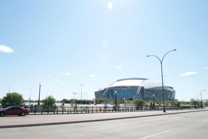 Arlington, estado Texas - Estados Unidos